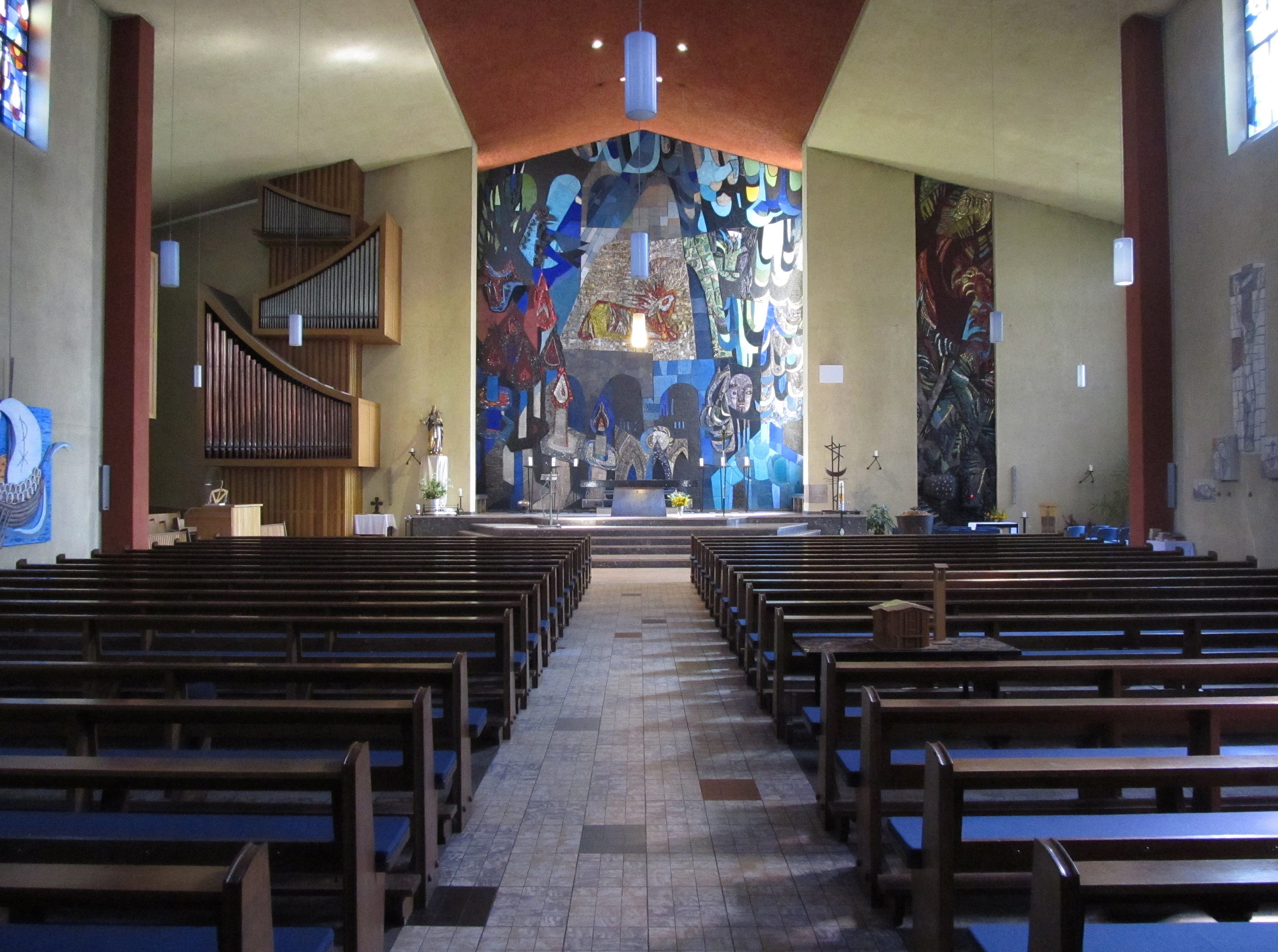 Blick ins Innere der katholischen Pfarrkirche Maria vom Frieden in Homburg-Erbach, Saarland